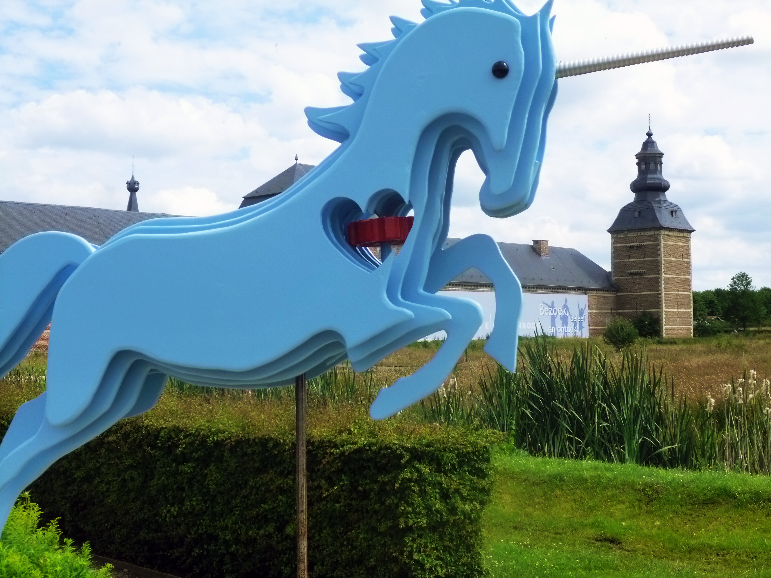 Mobile, de eenhoorn voorstellend, in de Kruiden- en Inspiratietuin van Herkenrode, ontworpen en uitgevoerd door de leerlingen van GO! Atheneum Overpelt